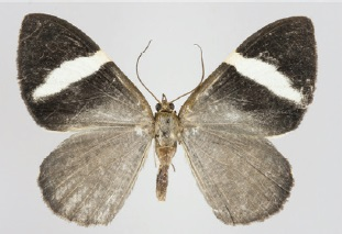 Hagnagora richardi